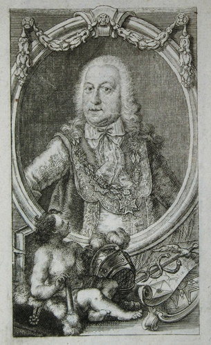 Franz Georg Ernst von Sturmfeder (1727-1793) pfalz-bayerischer Kämmerer und St. Georgs-Ritter